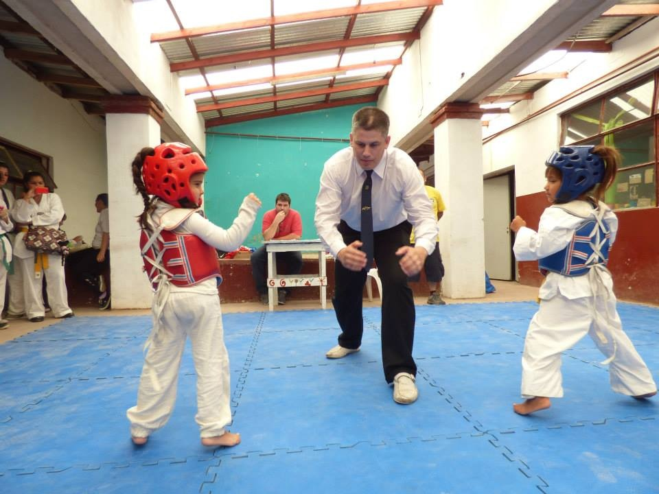 Arbitrando Taekwondo WTF categoria infantiles en Torneo Carlos Josef en la Ciudad de Mar del Plata